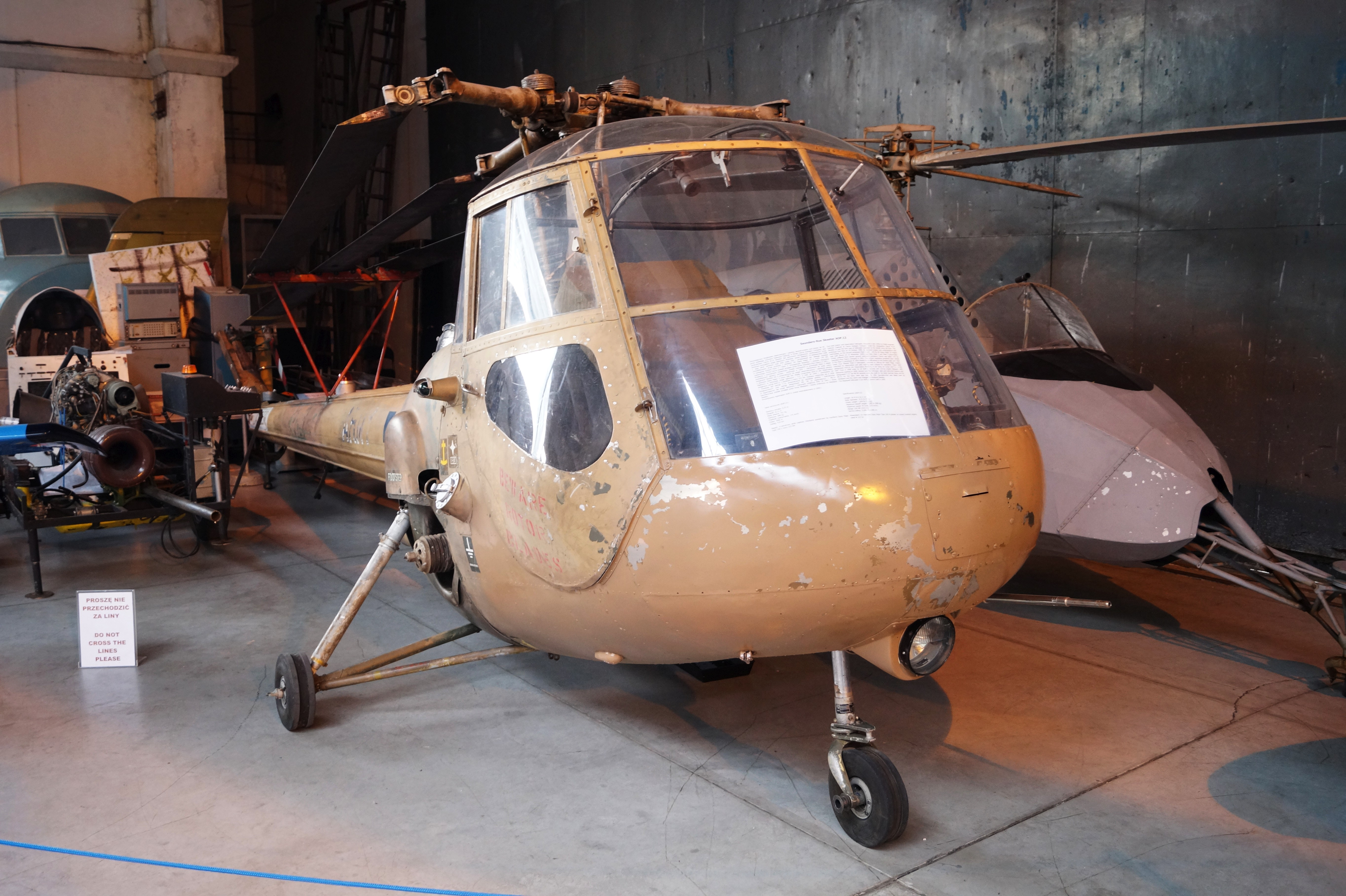 This photo was taken during Automotive Wikiexpedition 2016 set up by Wikimedia Polska Association. You can see all photographs in category Wikiekspedycja motoryzacyjna 2016. English | Polski | +/− Śmigłowiec Saunders-Roe Skeeter w Muzeum Lotnictwa Polskiego w Krakowie